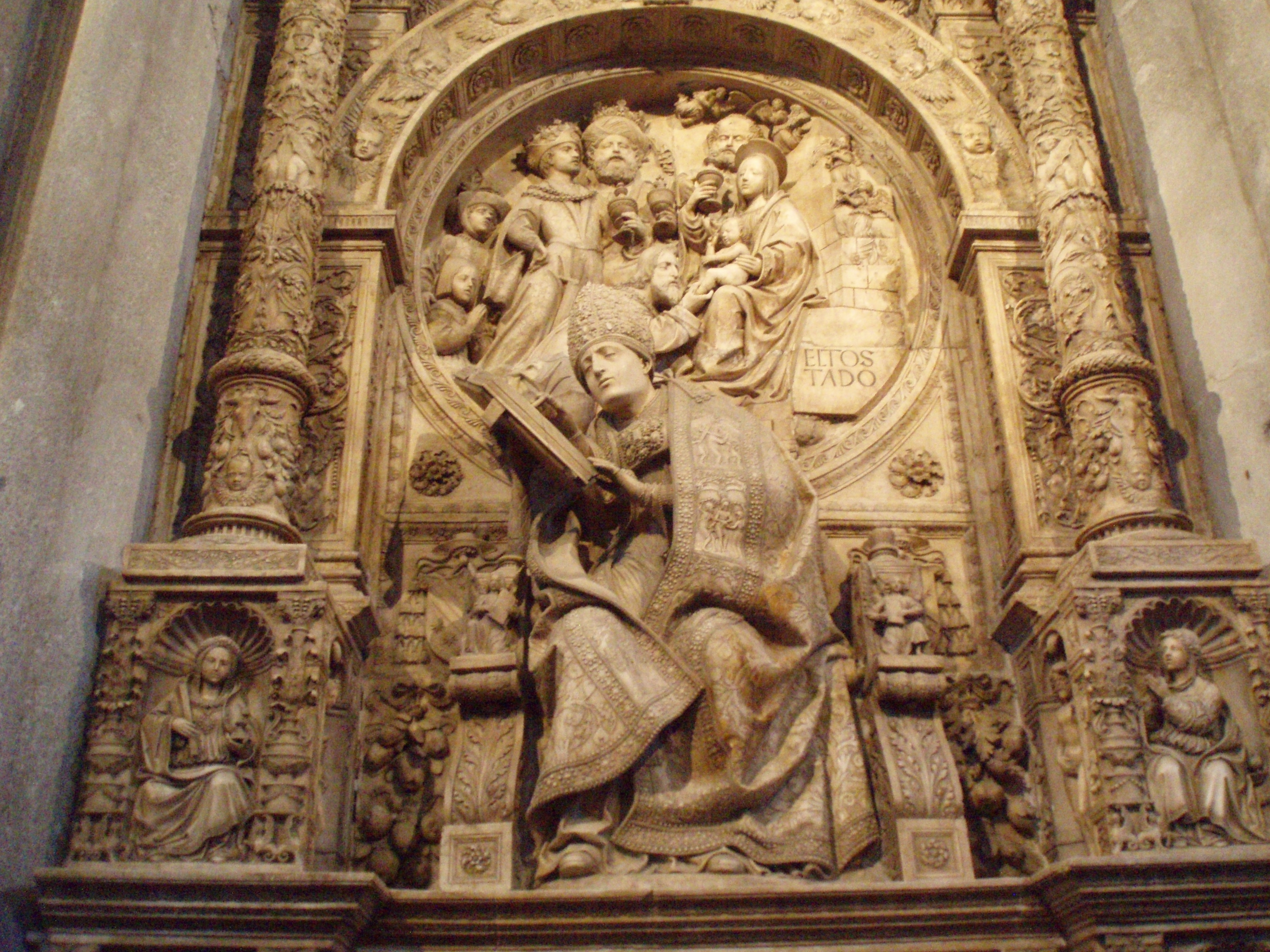 Sepulcro del prelado espáñol Alonso Fernández de Madrigal (1410-1455), Obispo de Ávila y conocido como el Tostado. Se encuentra en la catedral de Ávila, (España).